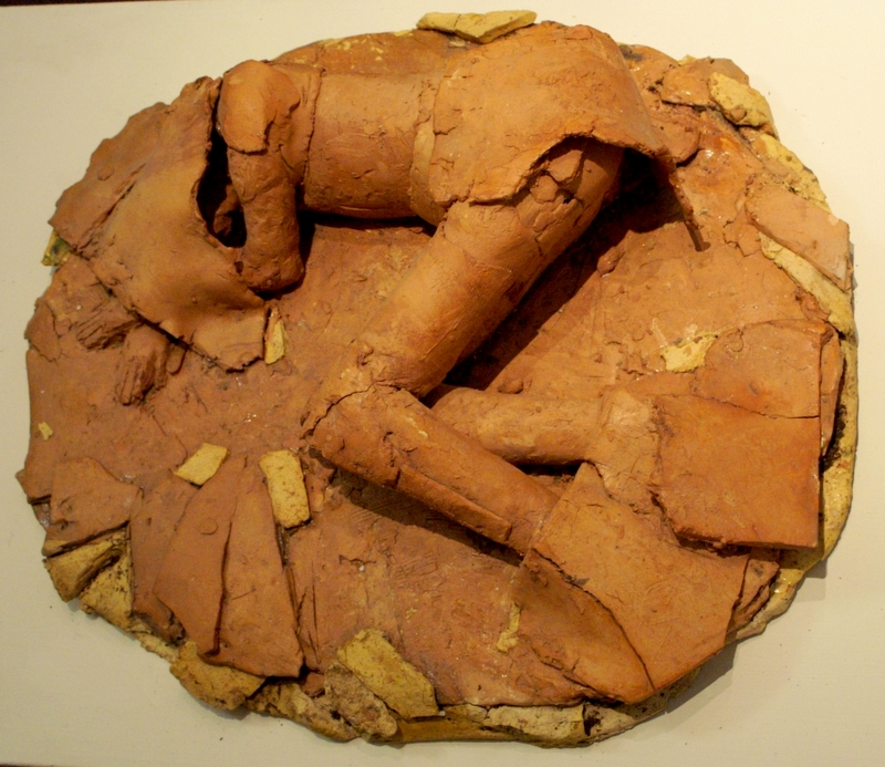 Terrakotta "Wie man sich bettet", 1993, Skulptur der Bildhauerin Heidi Wagner-Kerkhof. Sie wird als Teil eines Objekts zumeist auf Erde ausgestellt.